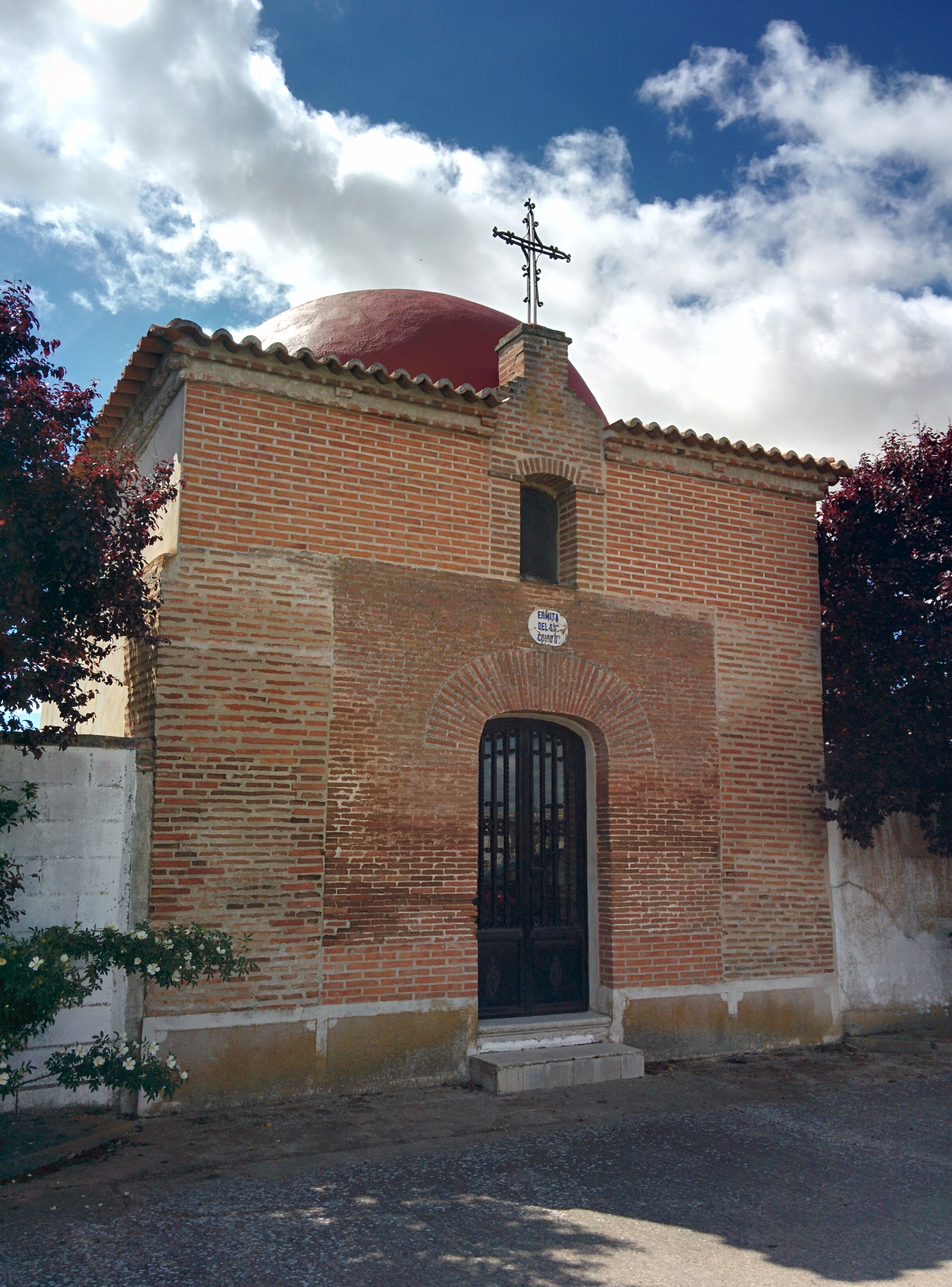 Ermita del Santo Cristo, en Nueva Villa de las Torres (Valladolid, España).